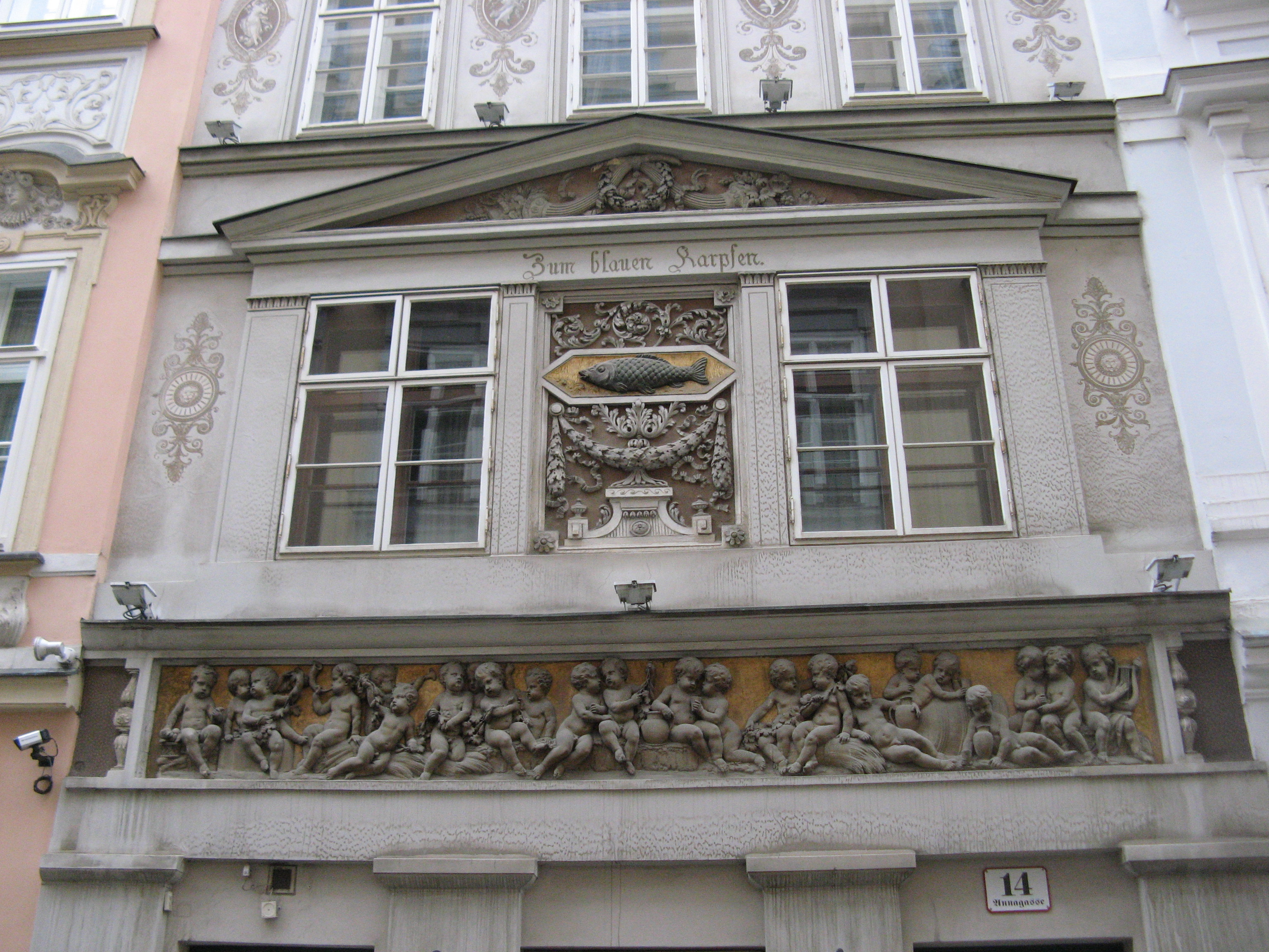 Zum blauen Karpfem, Detail, Annagasse 14, Wien-Innere Stadt